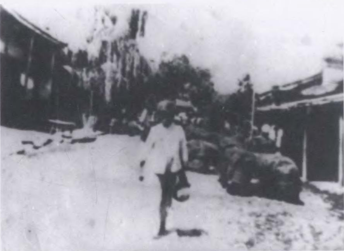 清朝芒允海关